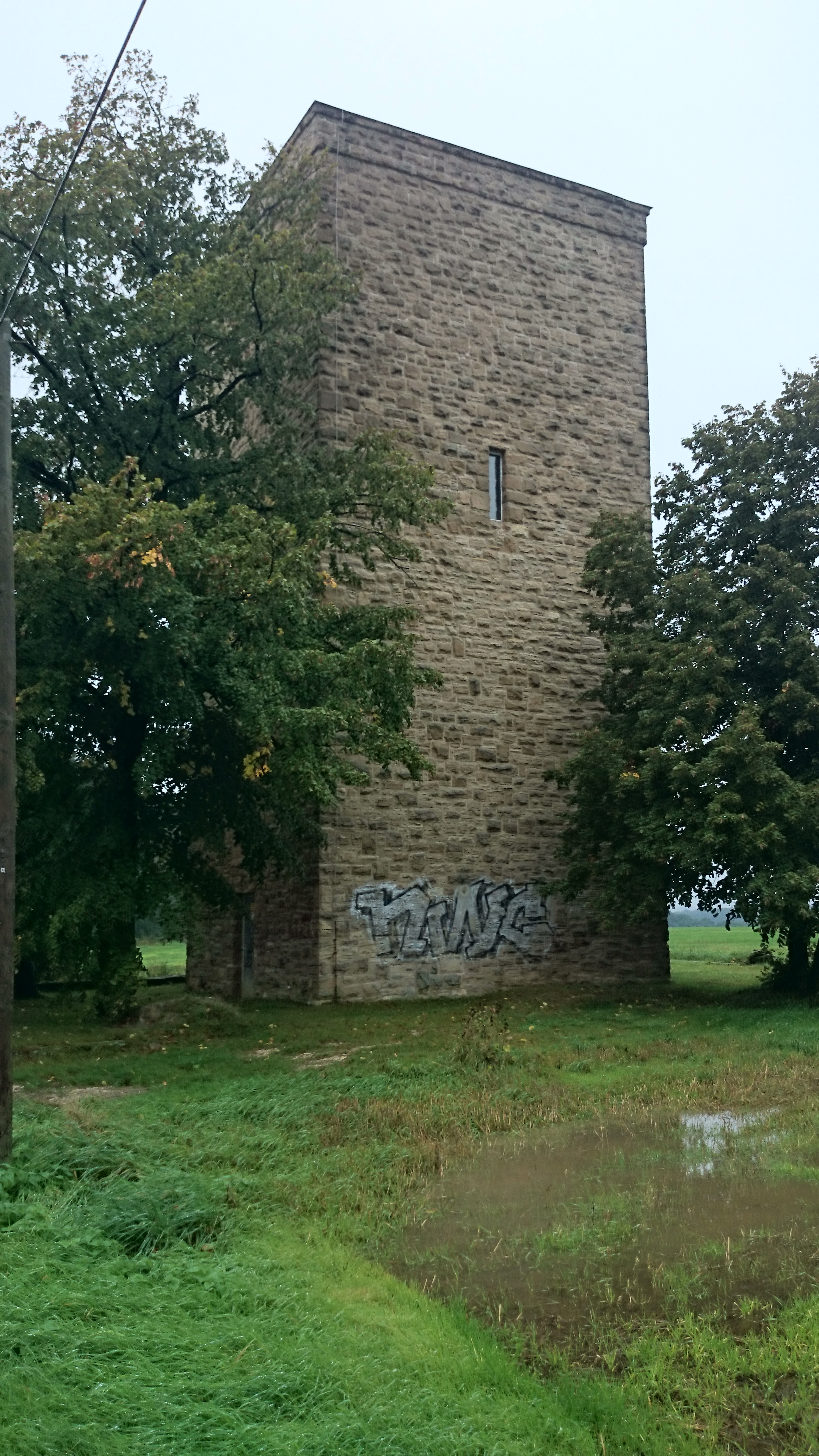 Wasserturm bei Droßdorf